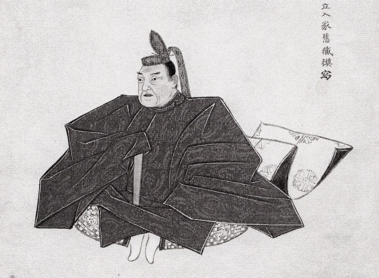 立入家3代当主・立入宗継の肖像画。